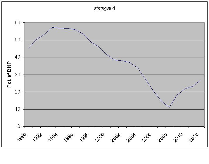 Statsgælden som % af BNP 1990-2012. Data fra og "Statens Låntagning og Gæld 1997"